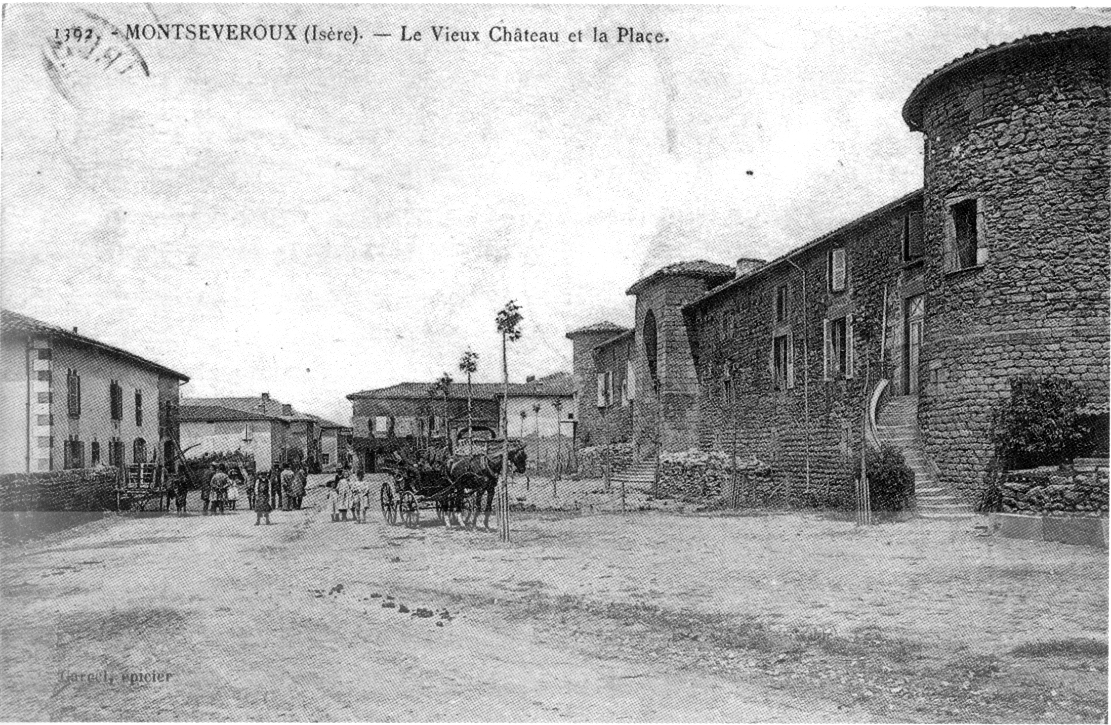 Montseveroux, le vieux chateau et la place en 1912